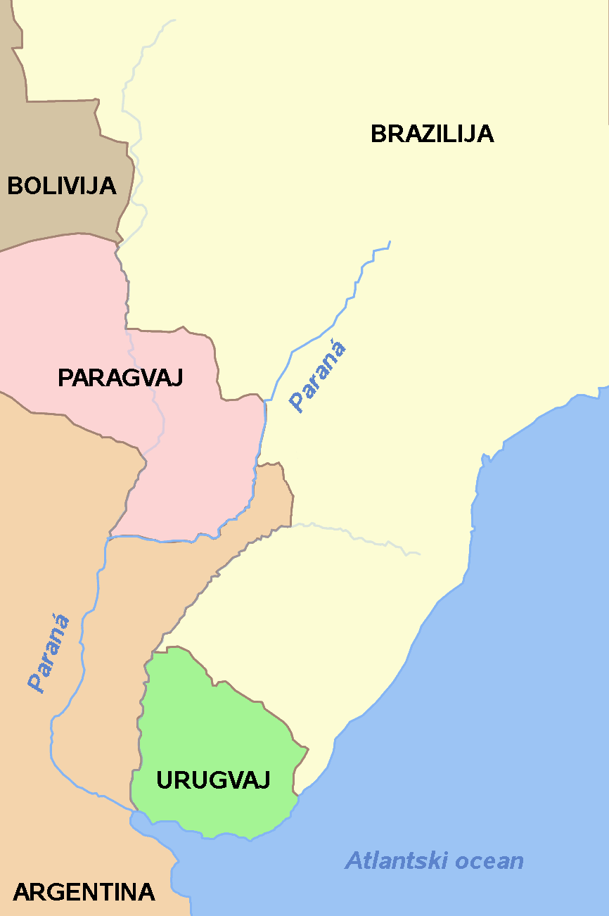 Poslovenjen zemljevid reke Paraná. Za predlogo je bil uporabljen izvirnik v Zbirki